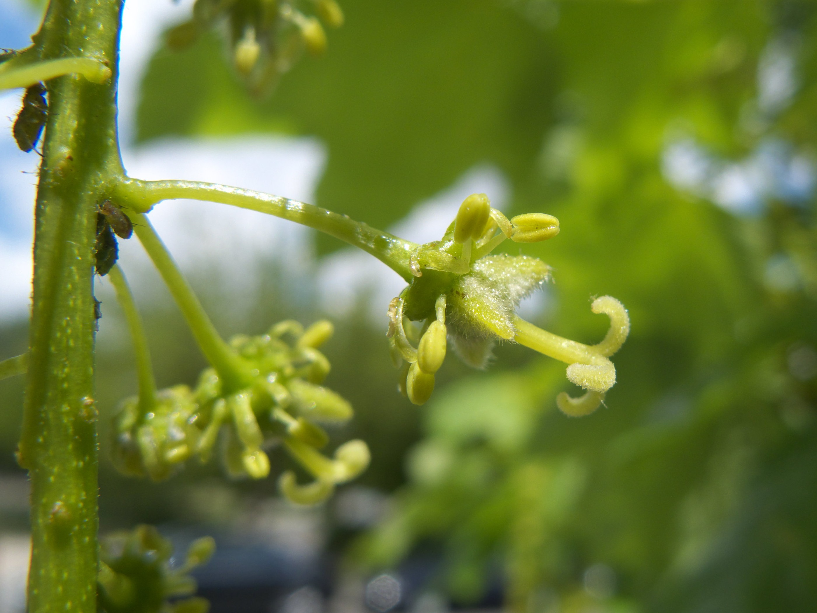 Flor tricarpelada de Acer pseudoplatanus, Madrid. Por lo general, suelen tener tan solo 2 carpelos.